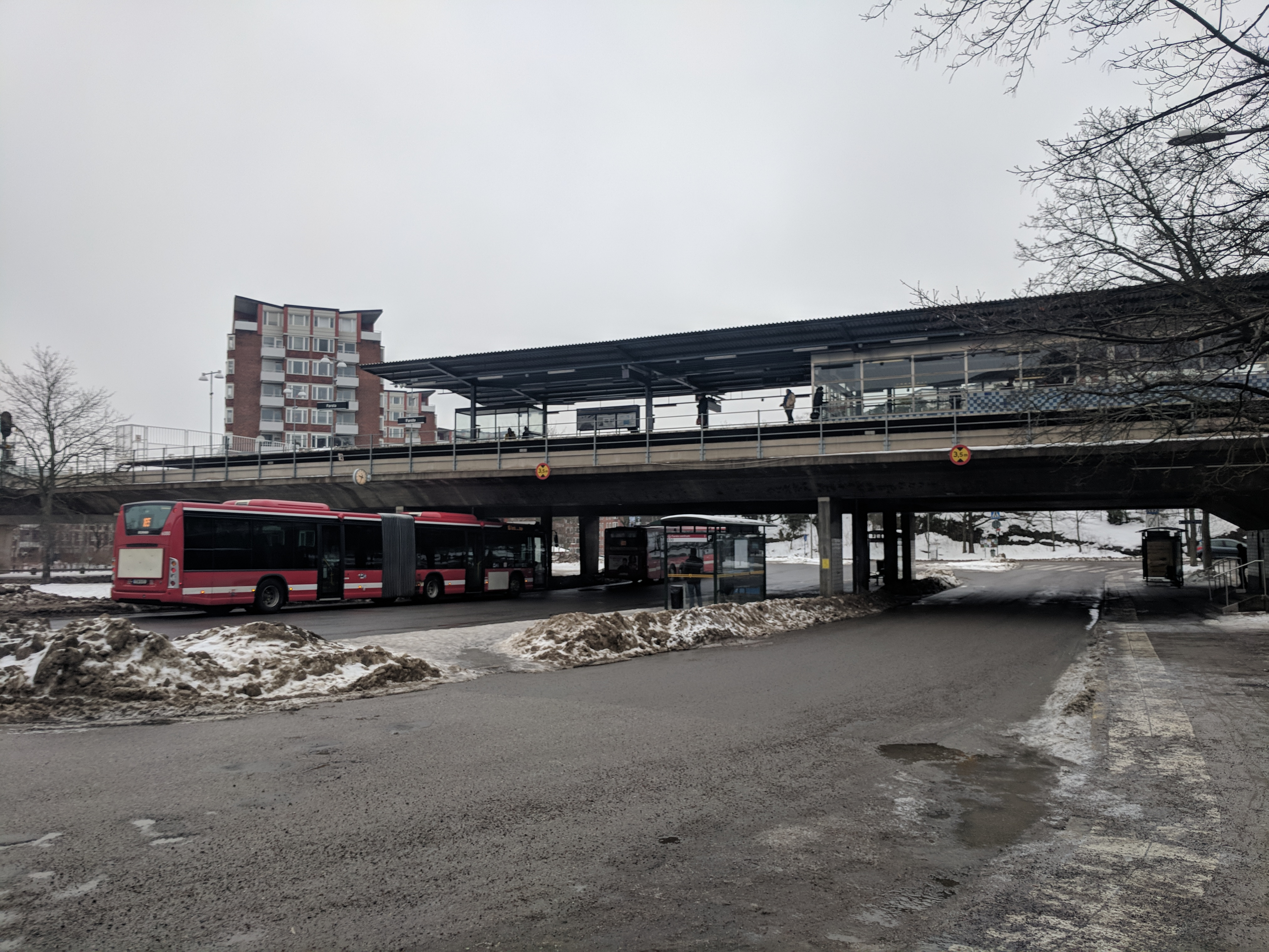 Farsta T-bana